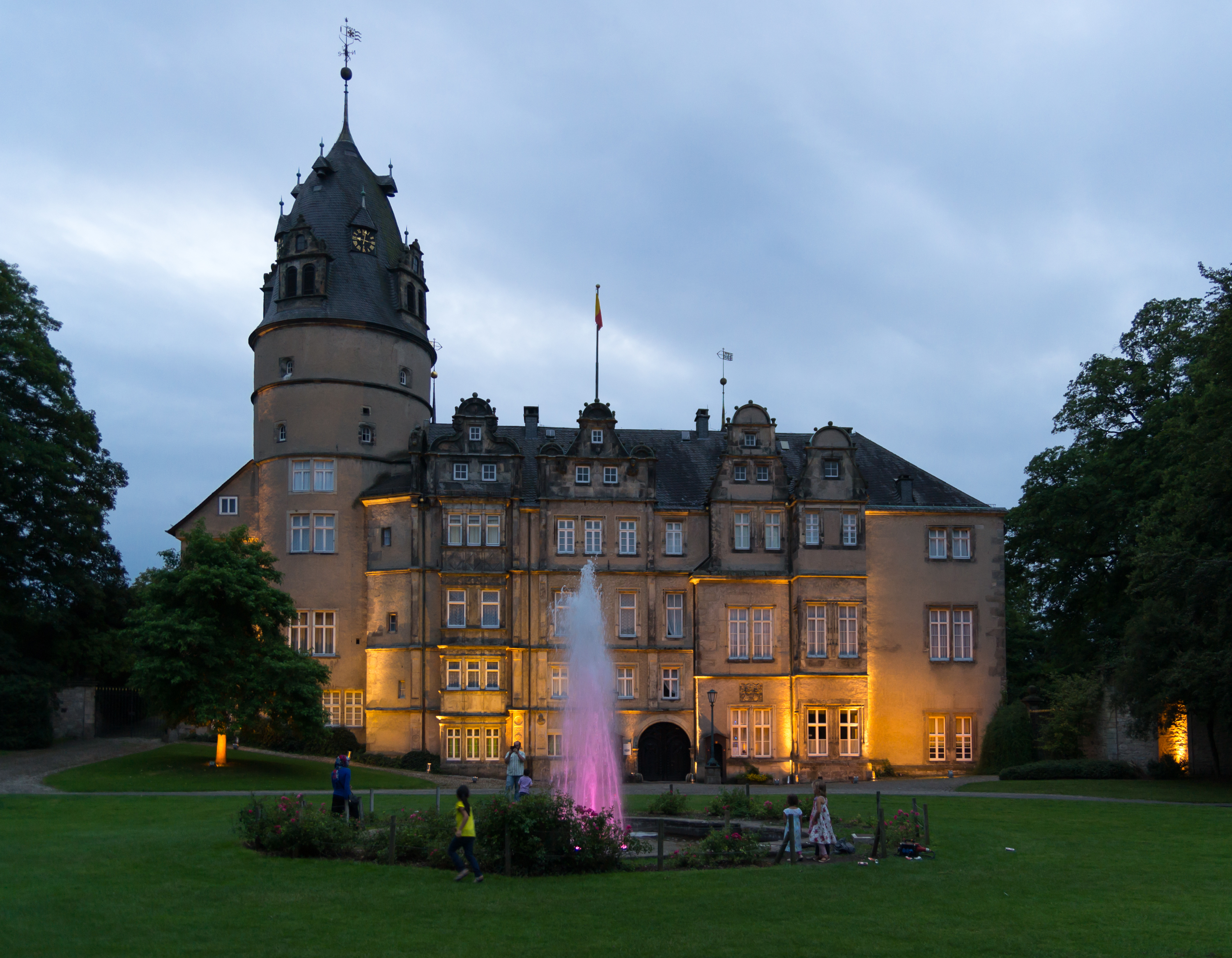 Illuminiertes Detmolder Schloss während Lippe kulinarisch 2014